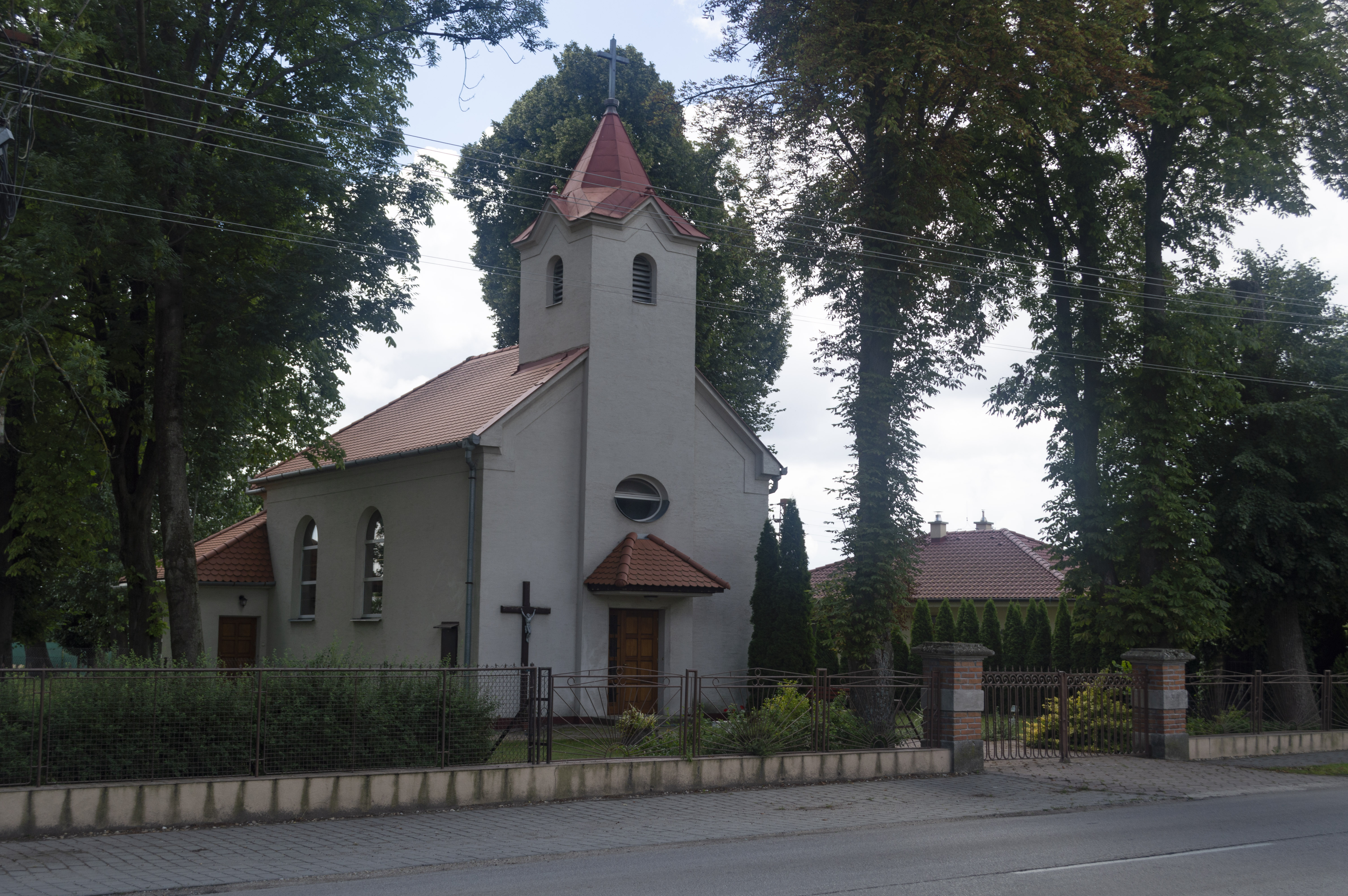 Jánovce, Slovensko - kostel